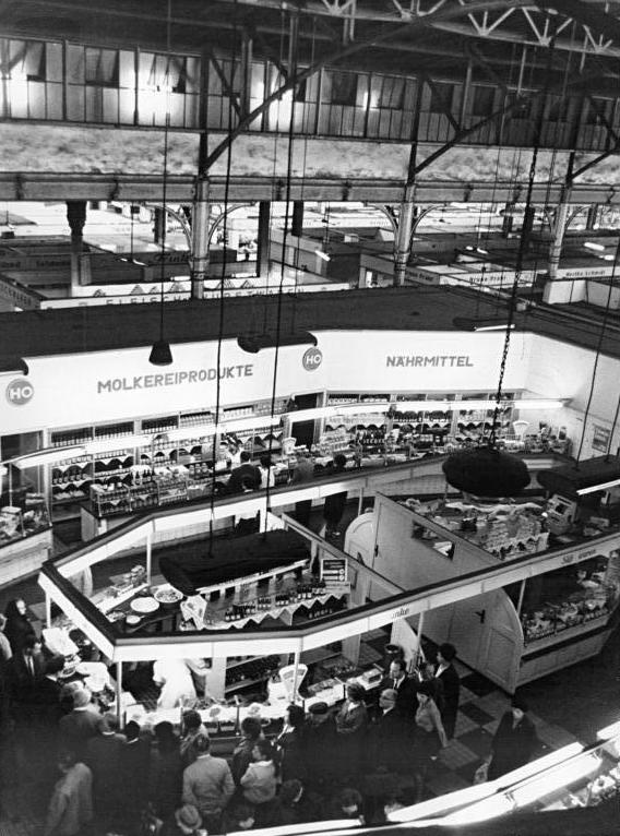 Berlin, Zentralmarkthalle, Ladenstraße Zentralbild Kulka 25.10.1965 Die Berliner Zentralmarkthalle am Alexanderplatz ist ein altes aber immer noch beliebtes Einkaufszentrum für die Berliner.